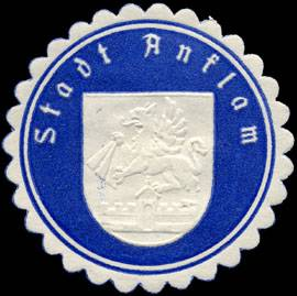 Sealing stamp Title: Stadt Anklam Description: blau, weiß, geprägt Place: Anklam size: 4 cm